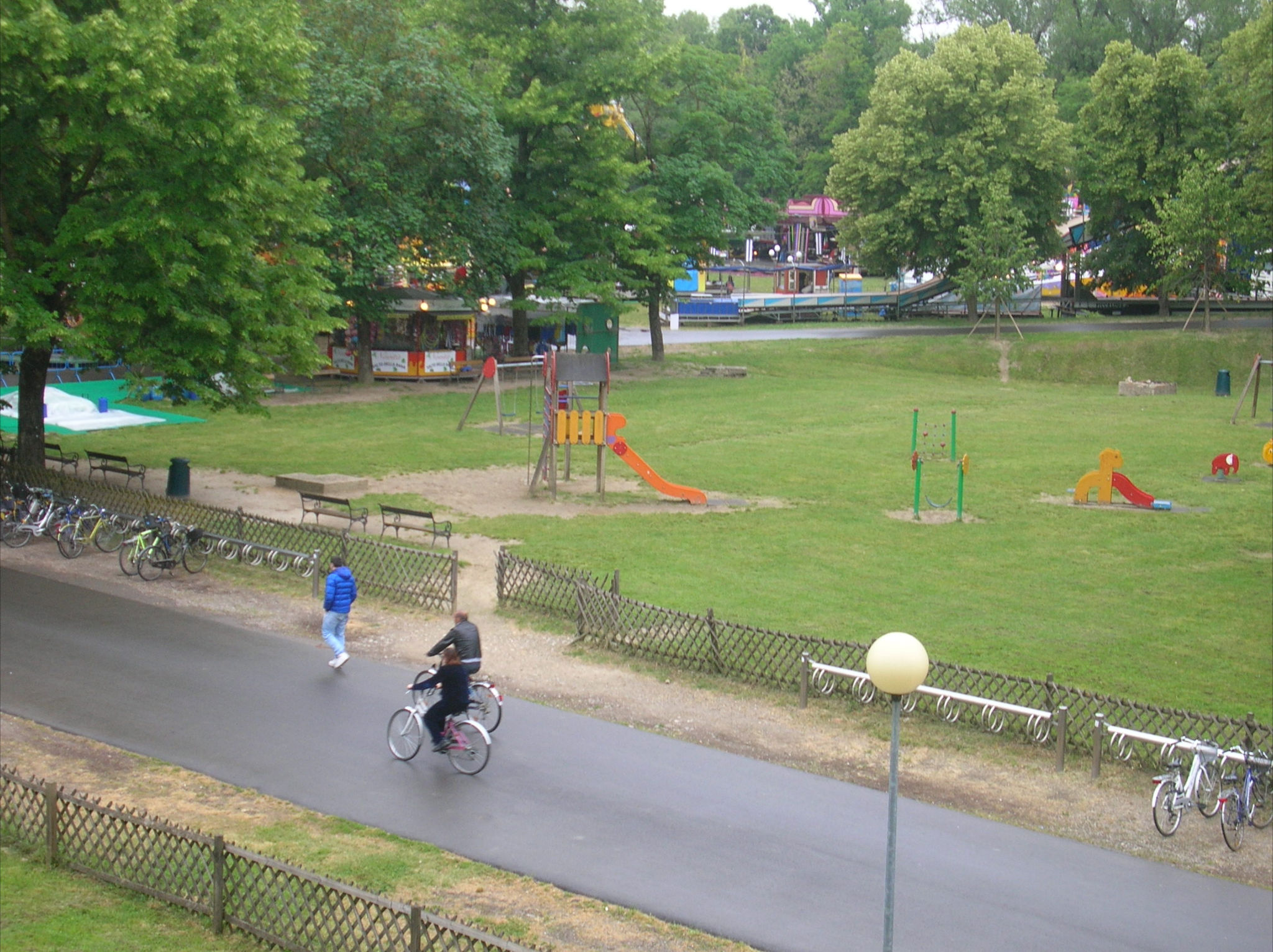 Parco Cittadella di Parma